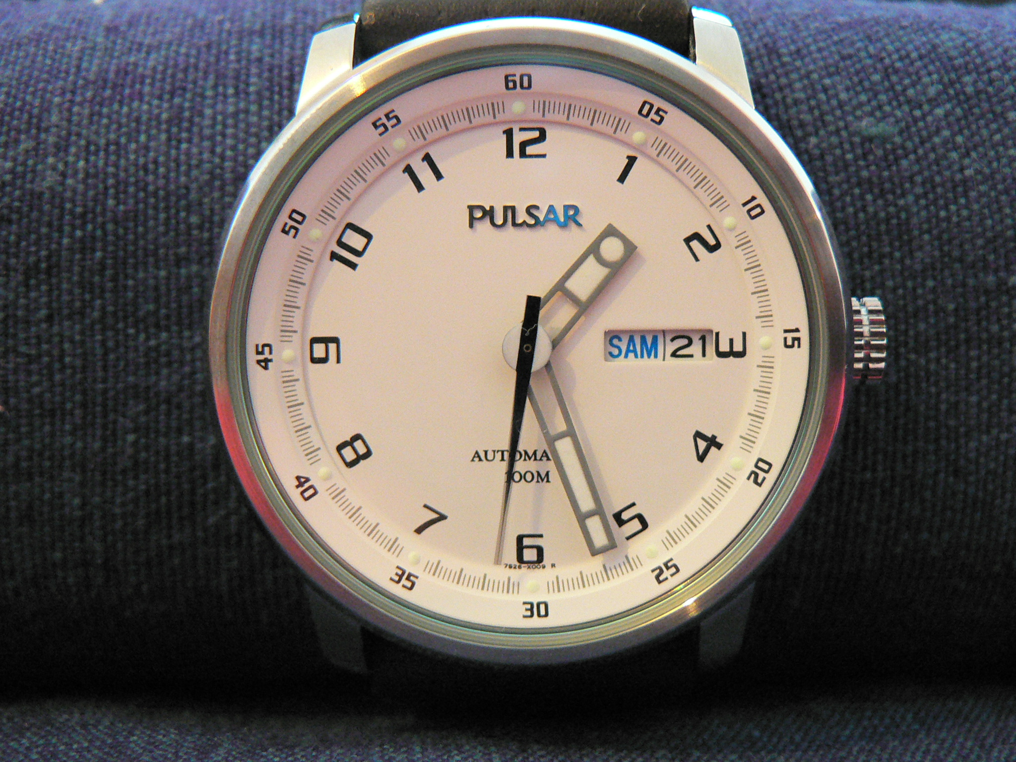 Montre Pulsar